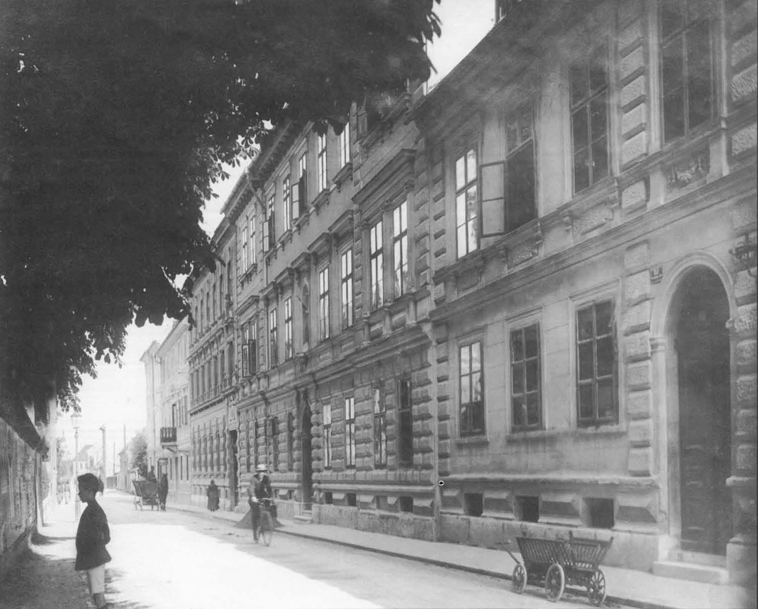 Rokodelski dom at Komenski Street, 1925. The palace was built in 1887.